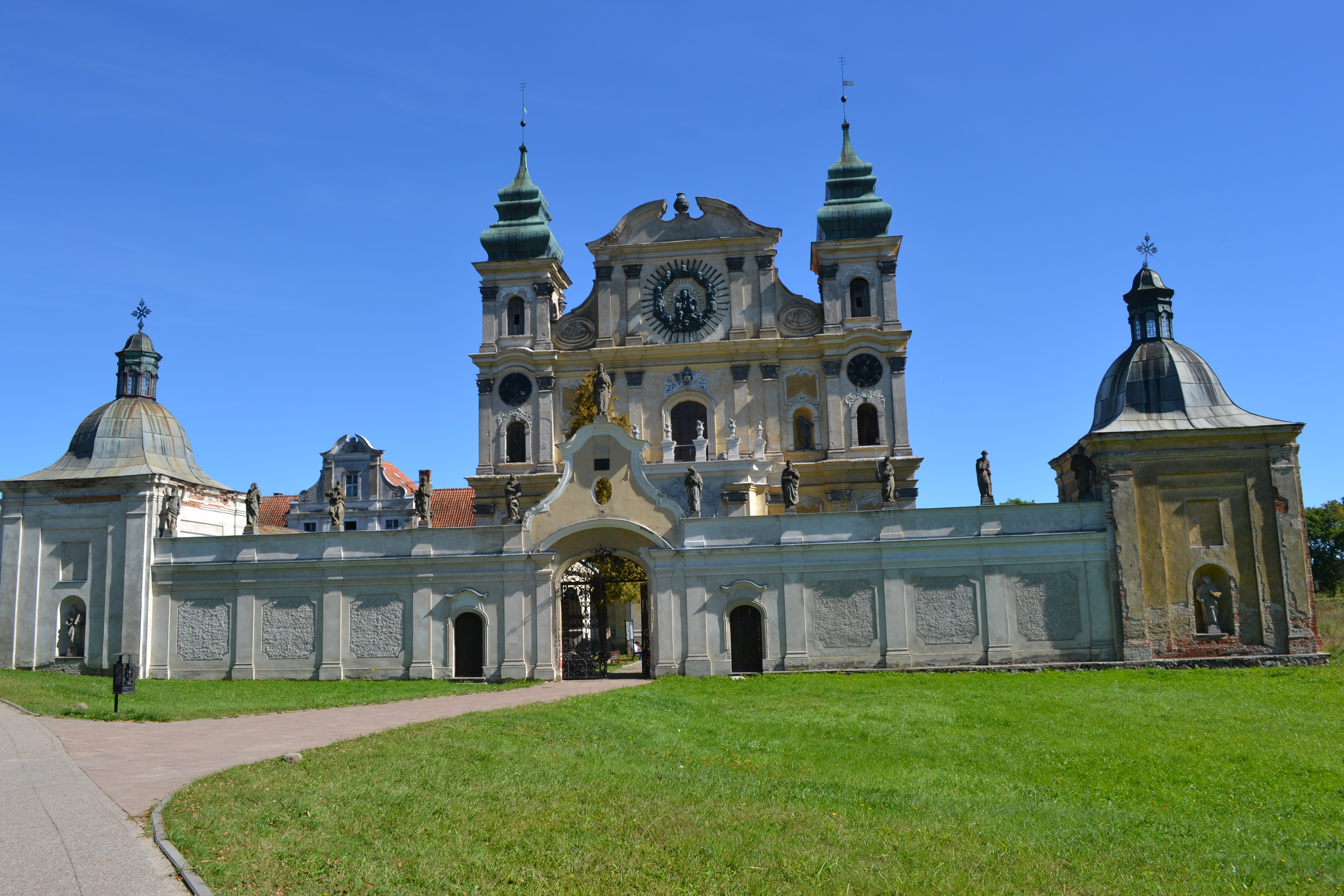 Krosno, zespół kościoła odpustowego p.w. Nawiedzenia NMP i św. Józefa, 1 poł. XVIII